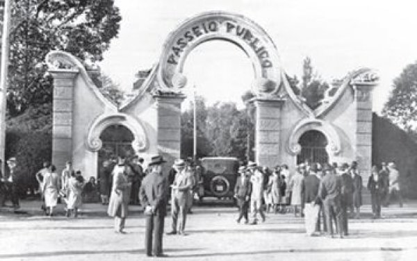 Portão do Passeio Público (Curitiba) - foto da década de 1930.